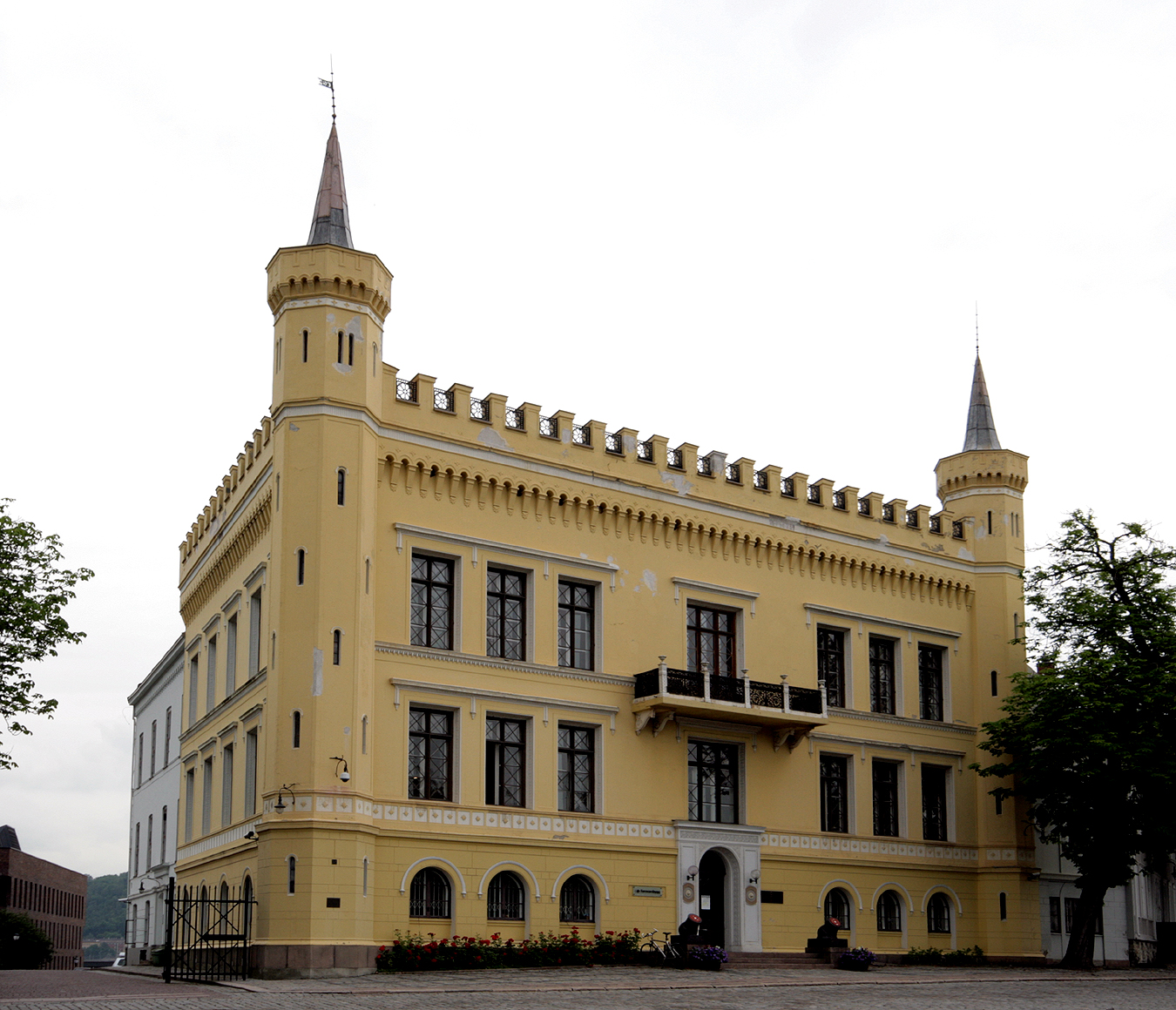 General Glads gård, Akershus festning, Oslo. Oppført 1844. Arkitekt: Johan Henrik Nebelong.